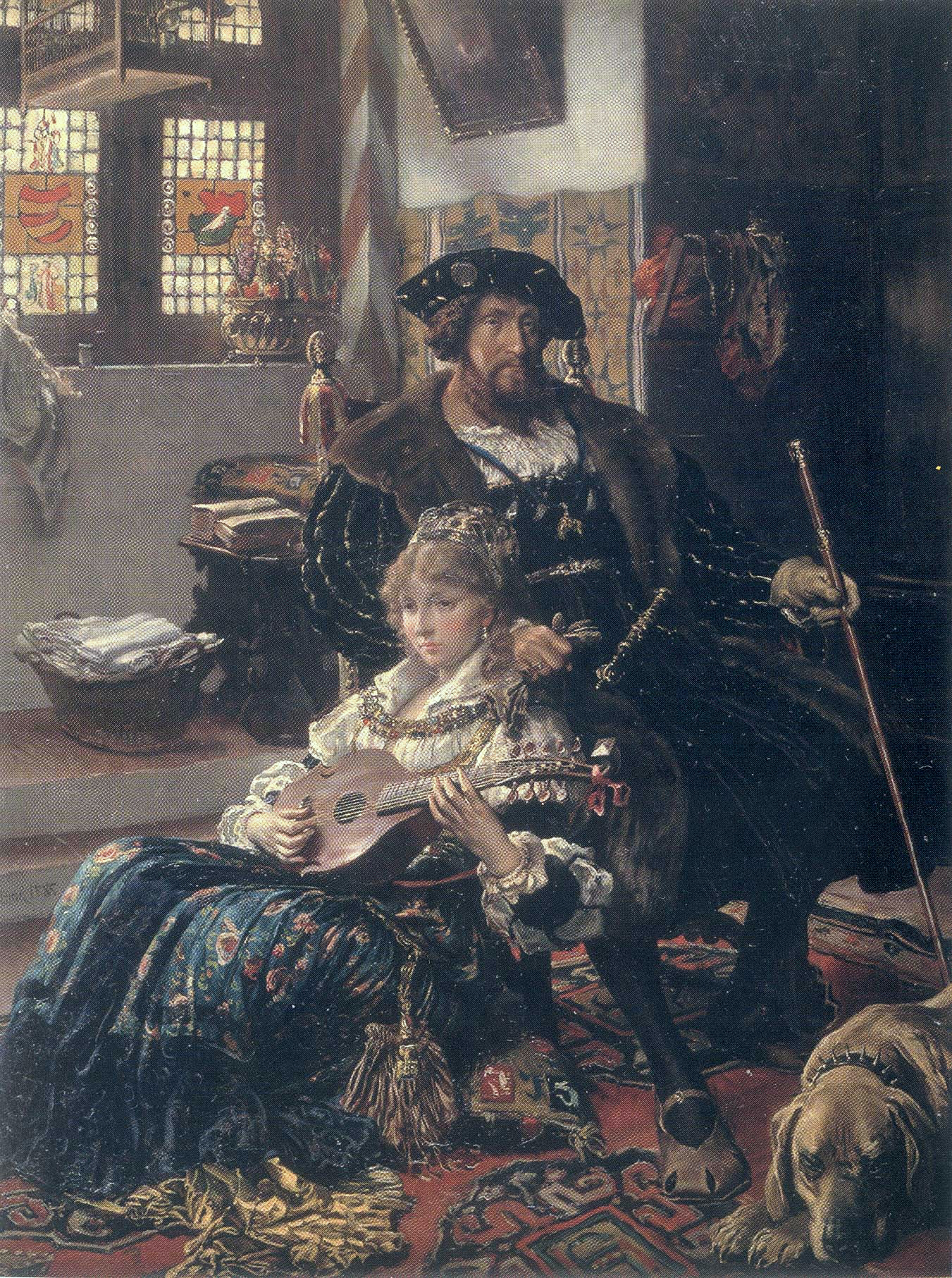 Ingen ved hvordan Dyveke så ud – maleren forestillede sig hende og Christian 2. således.